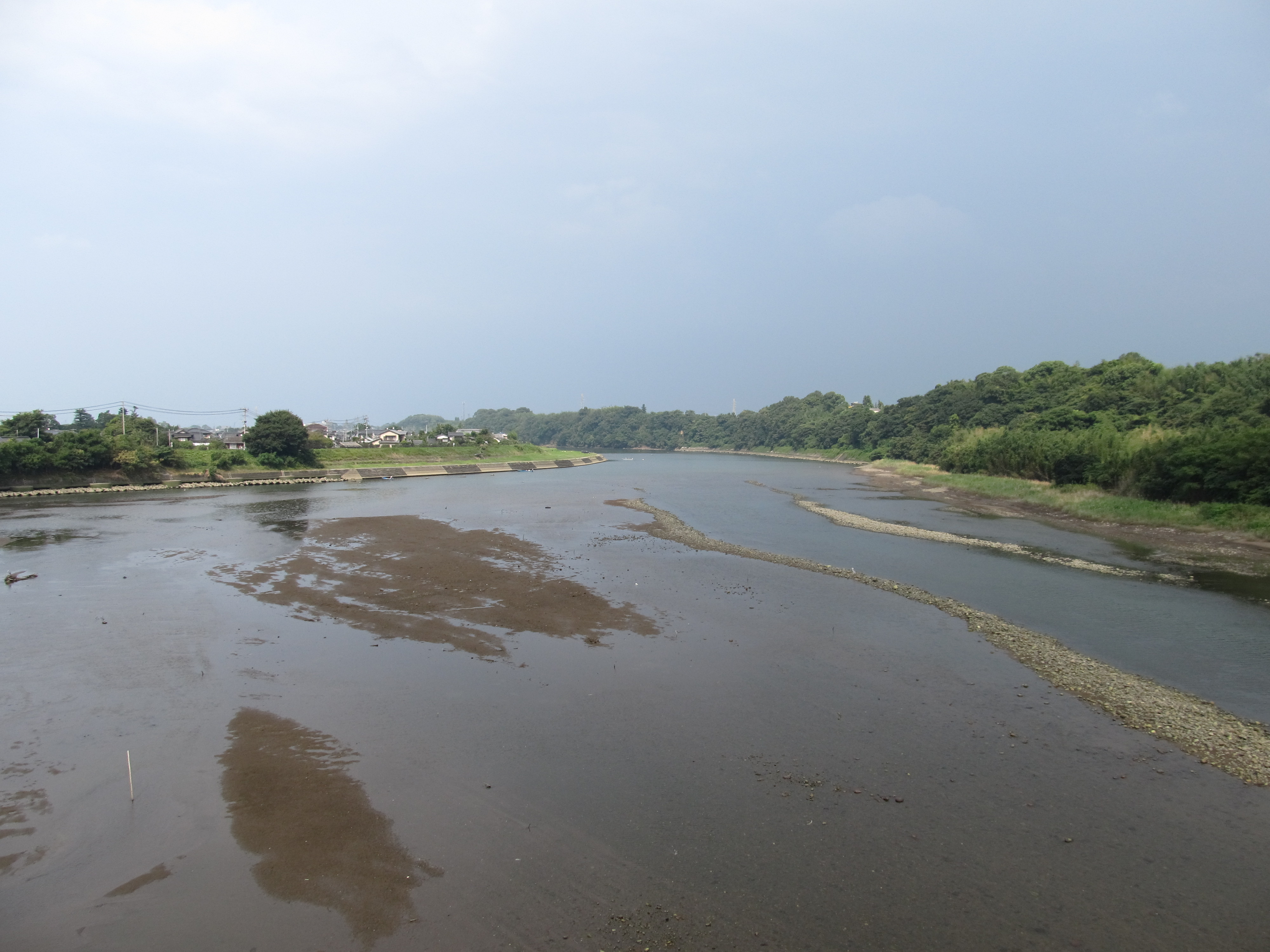 大分県宇佐市を流れる駅館川